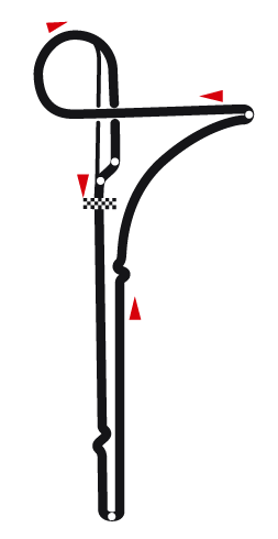 Palanga racing circuit